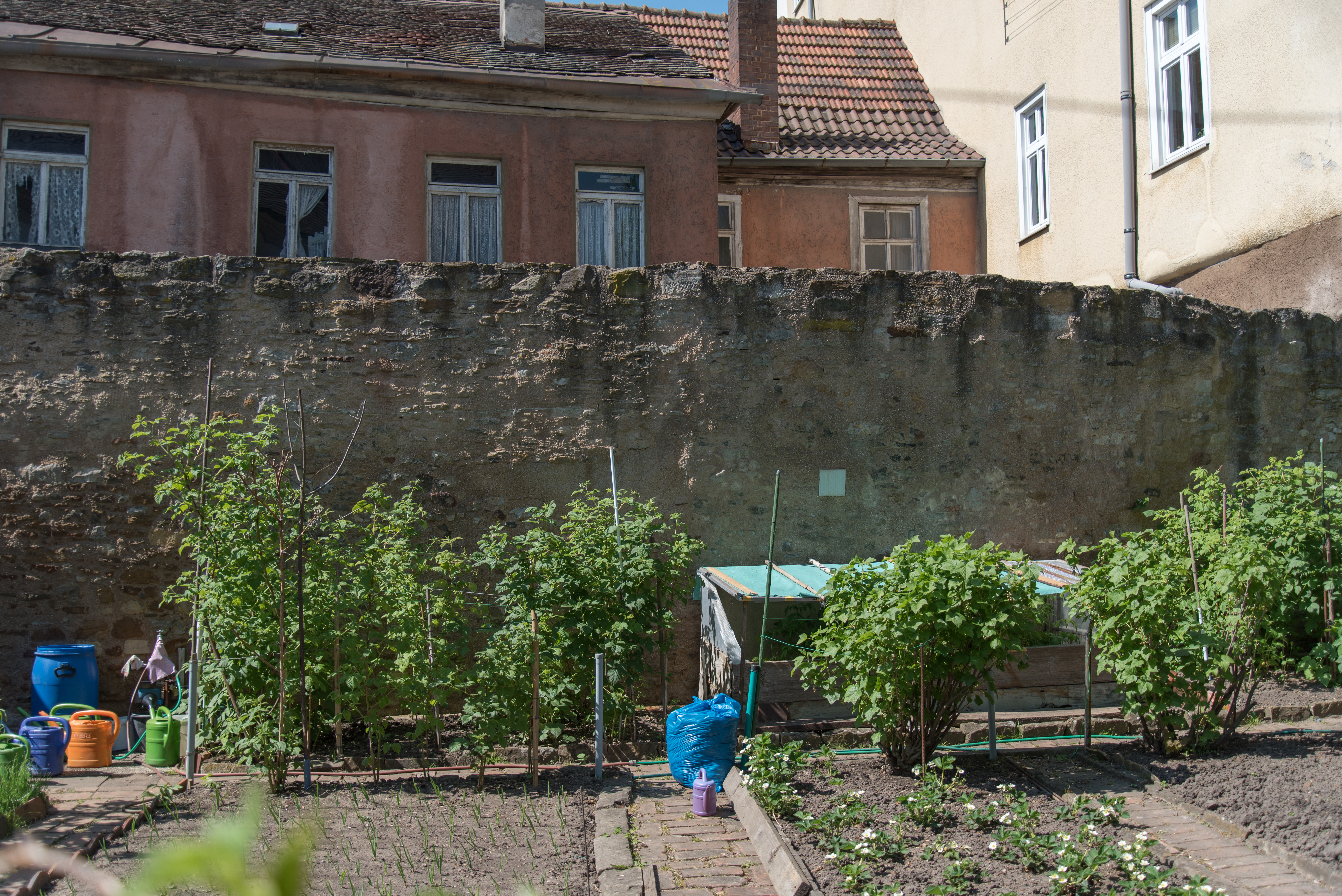 Schweinfurt, Frauengasse 1, Befestigungsmauer der Reichsburg